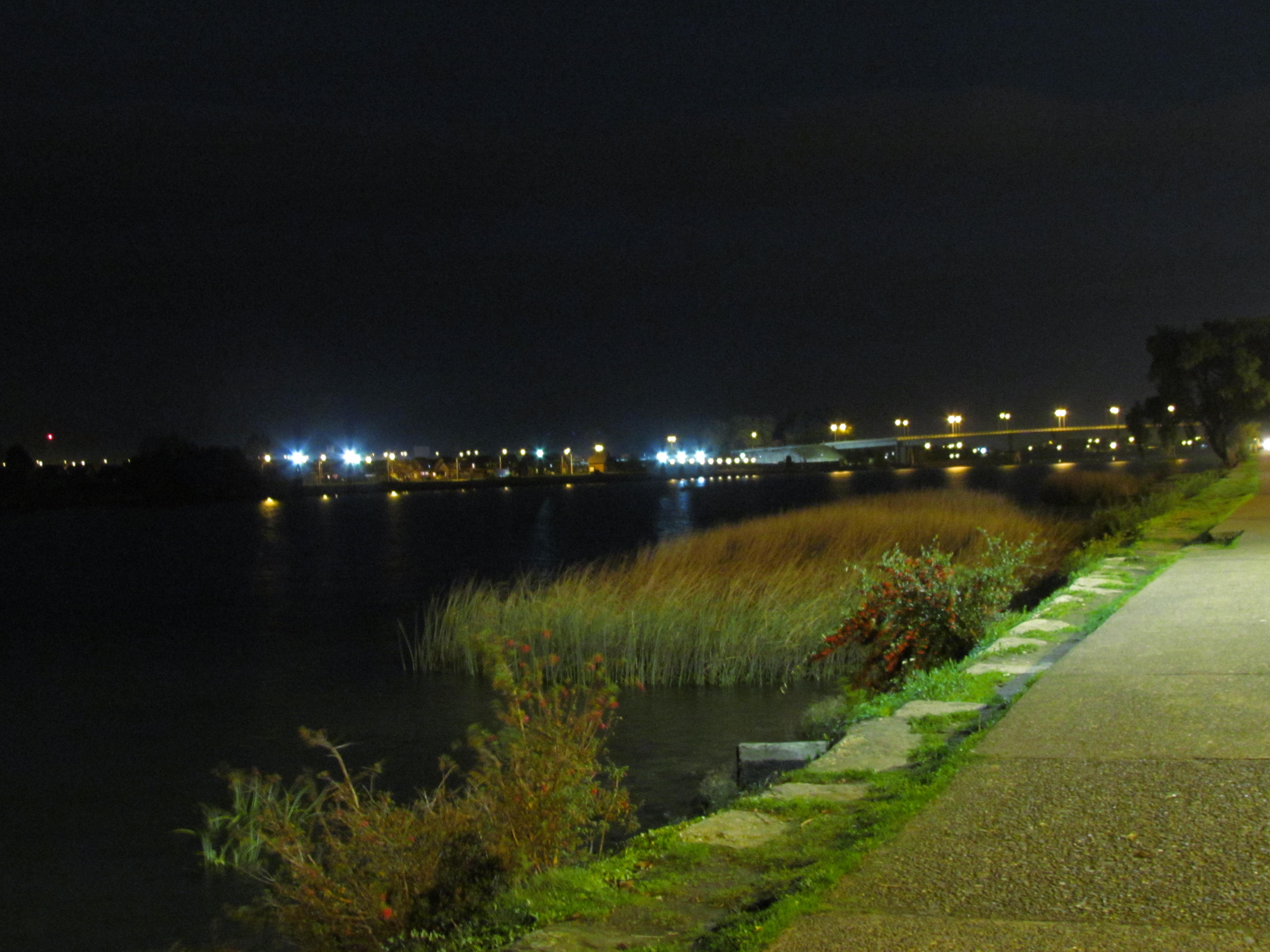 Rio Calle Calle